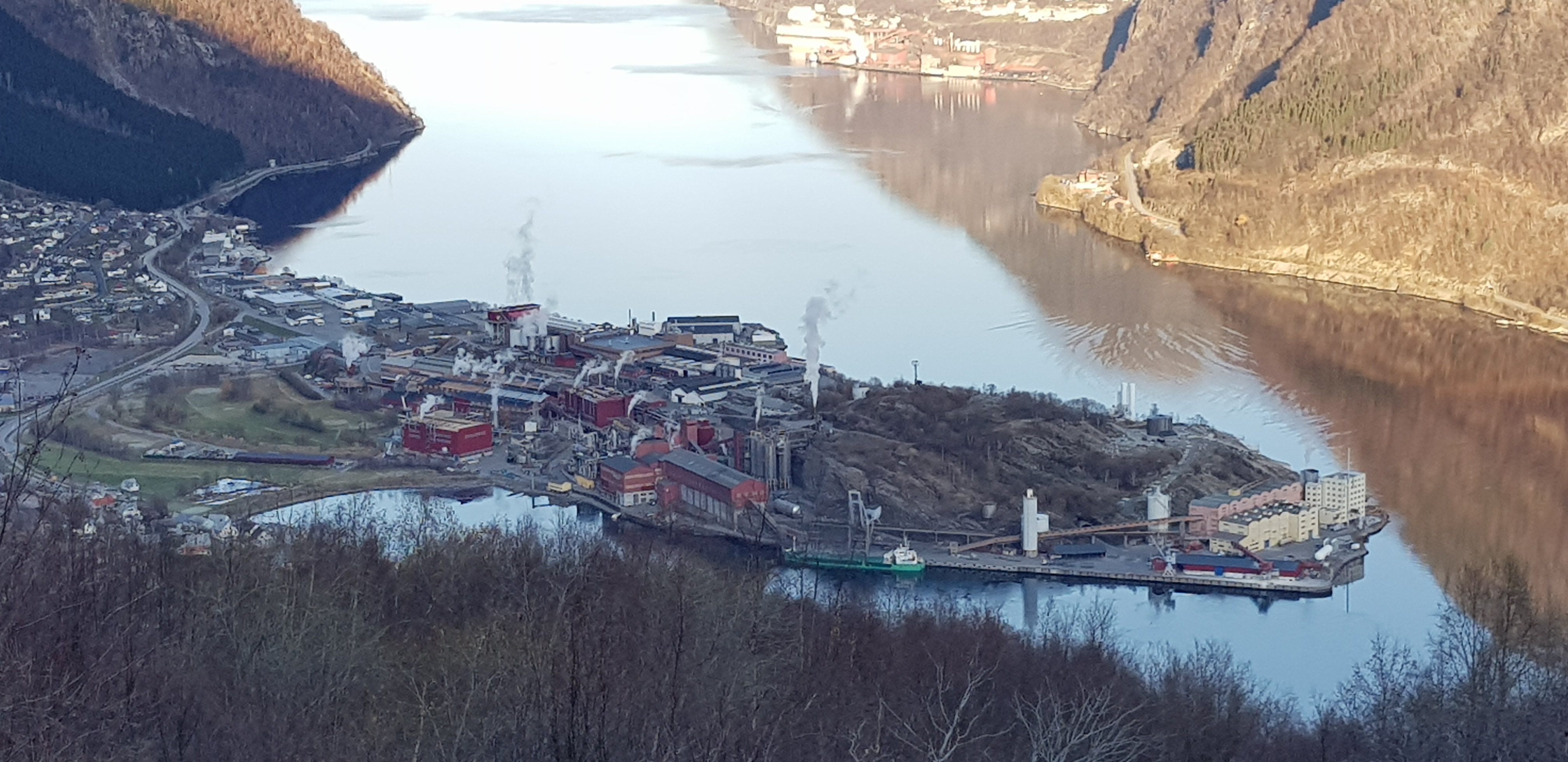 Oversiktbilde av Boliden Odda AS. Bildet er tatt mot nord med Sørfjorden i bakgrunn.